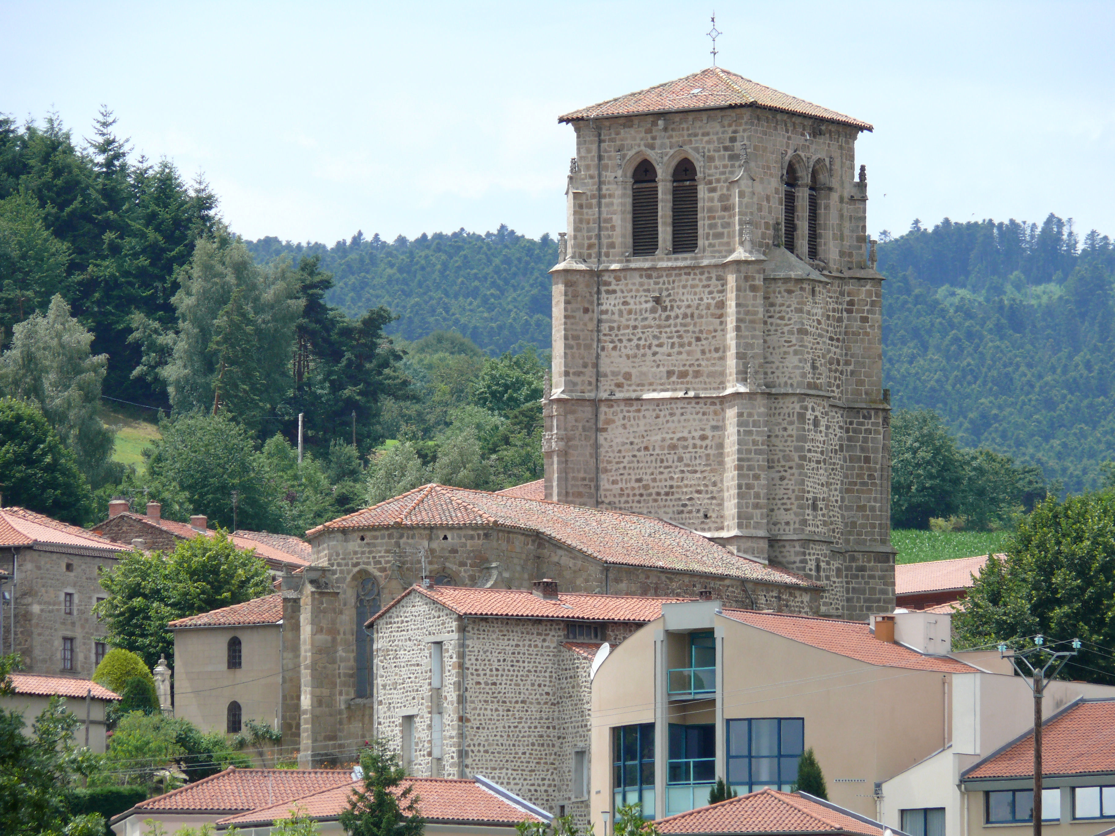 Verrières-en-Forez - Eglise et village